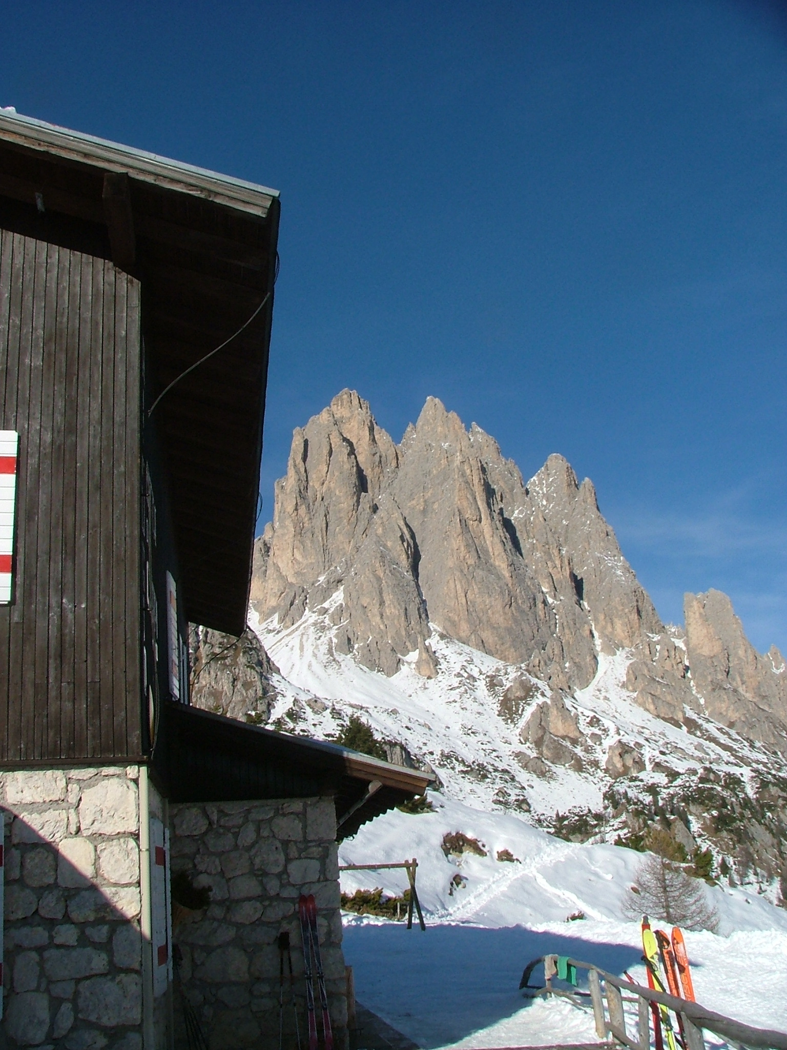 Cadini di Misurina form Rifugio città di Carpi, Auronzo di Cadore, Belluno, Dolomites, Veneto, Italy